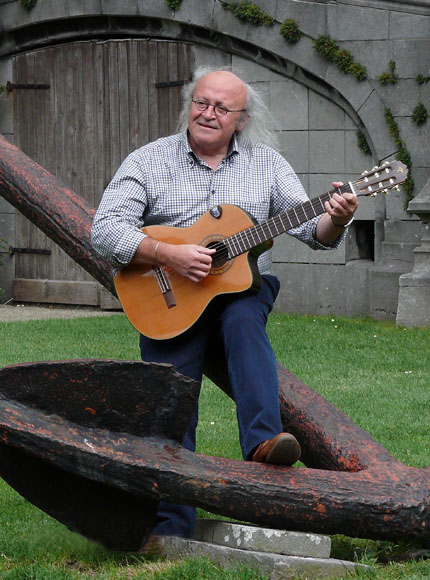 Der belgische Sänger Freddy Birset 2007.